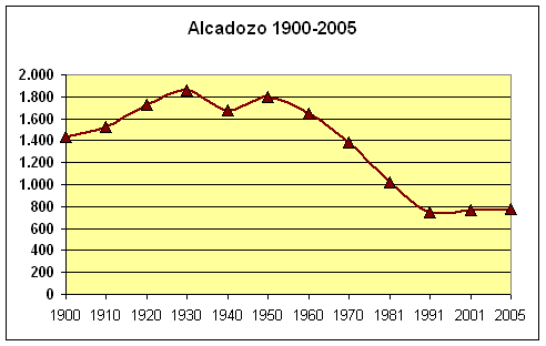 Población de Alcadozo (1900-2005). Alcadozo's population, Albacete, Spain, (1900-2005). Own work, given to PD. Source: Instituto Nacional de Estadística.